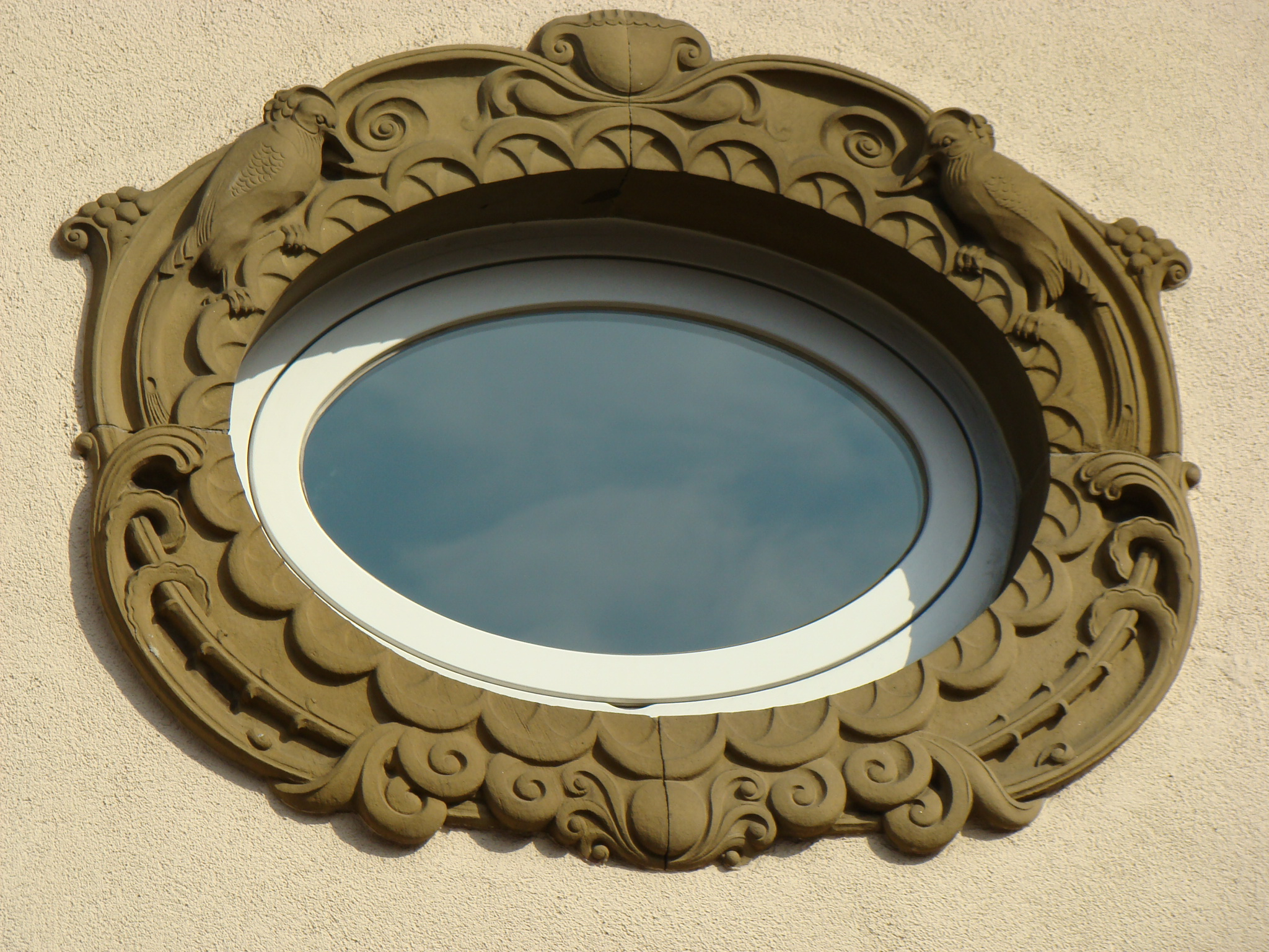 Cäcilienstraße 58 in Heilbronn, Fensterdetail